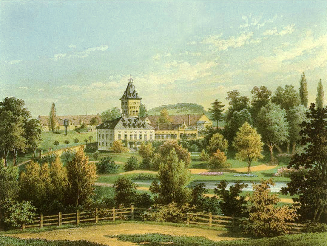 Schloss Peilau-Gladishof, Kreis Reichenbach, Provinz Schlesien